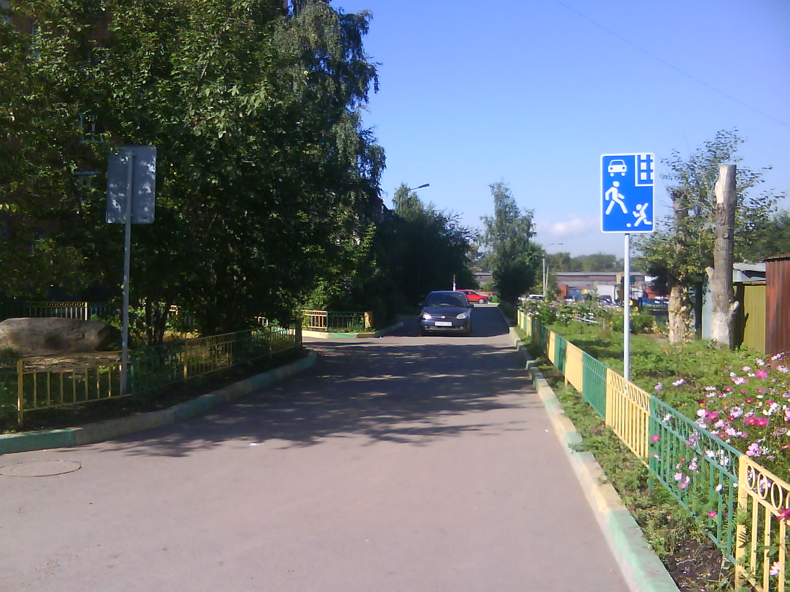 Жилой двор по ул. Энергетиков